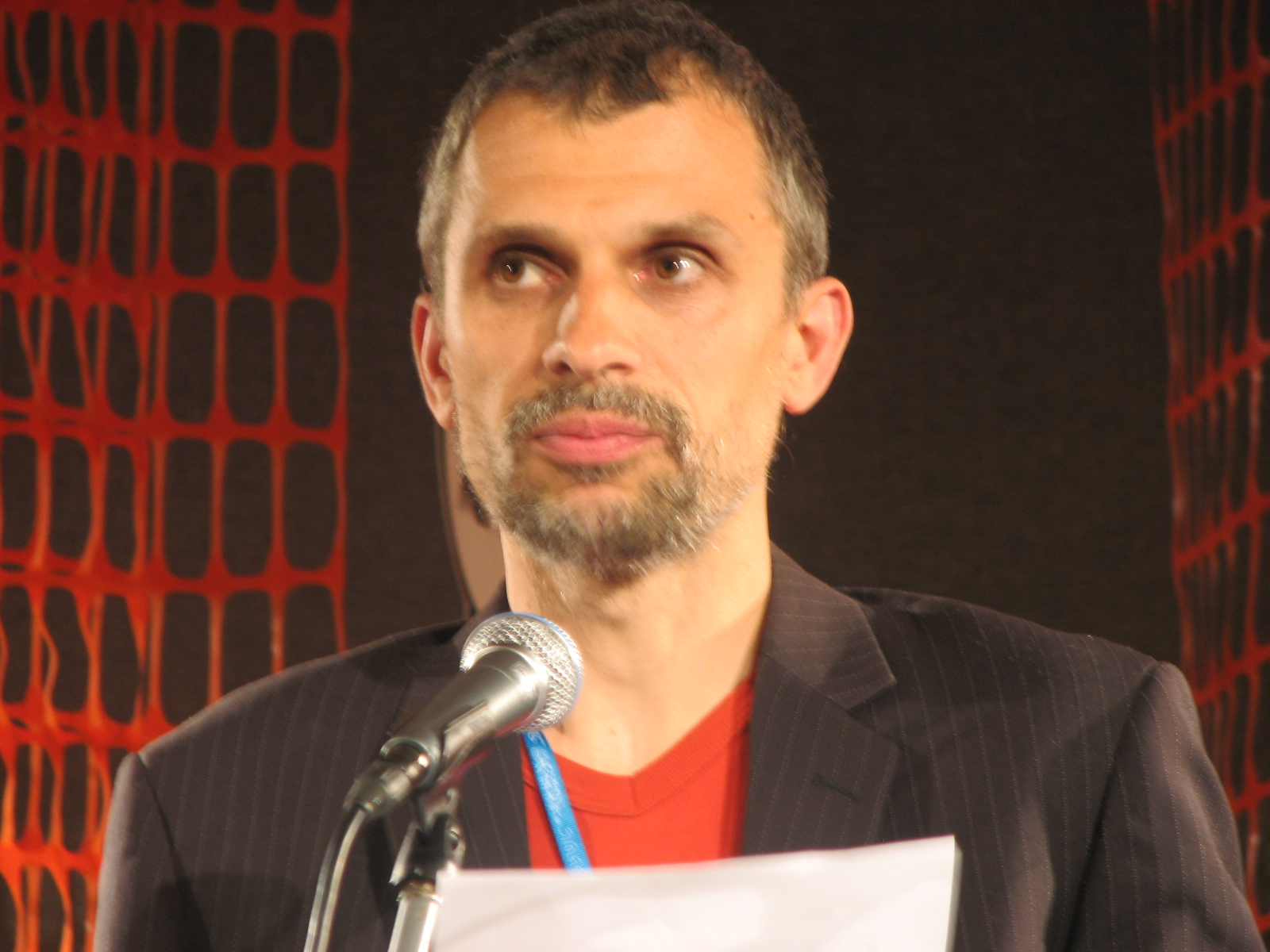 Mathura esitamas oma loomingut kirjandusfestivalil HeadRead 2011